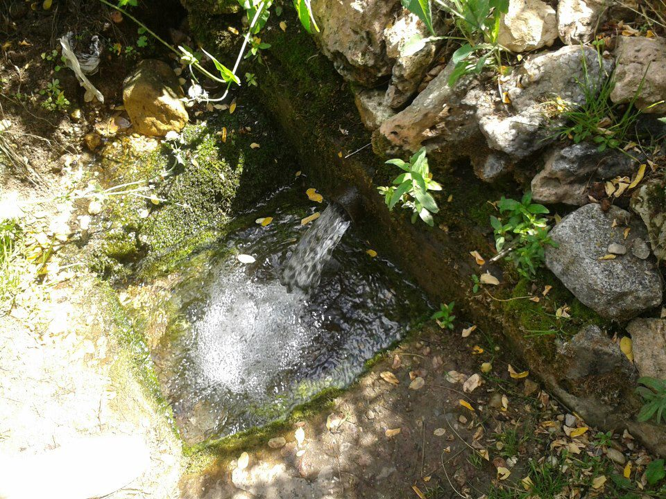 FuenteFU